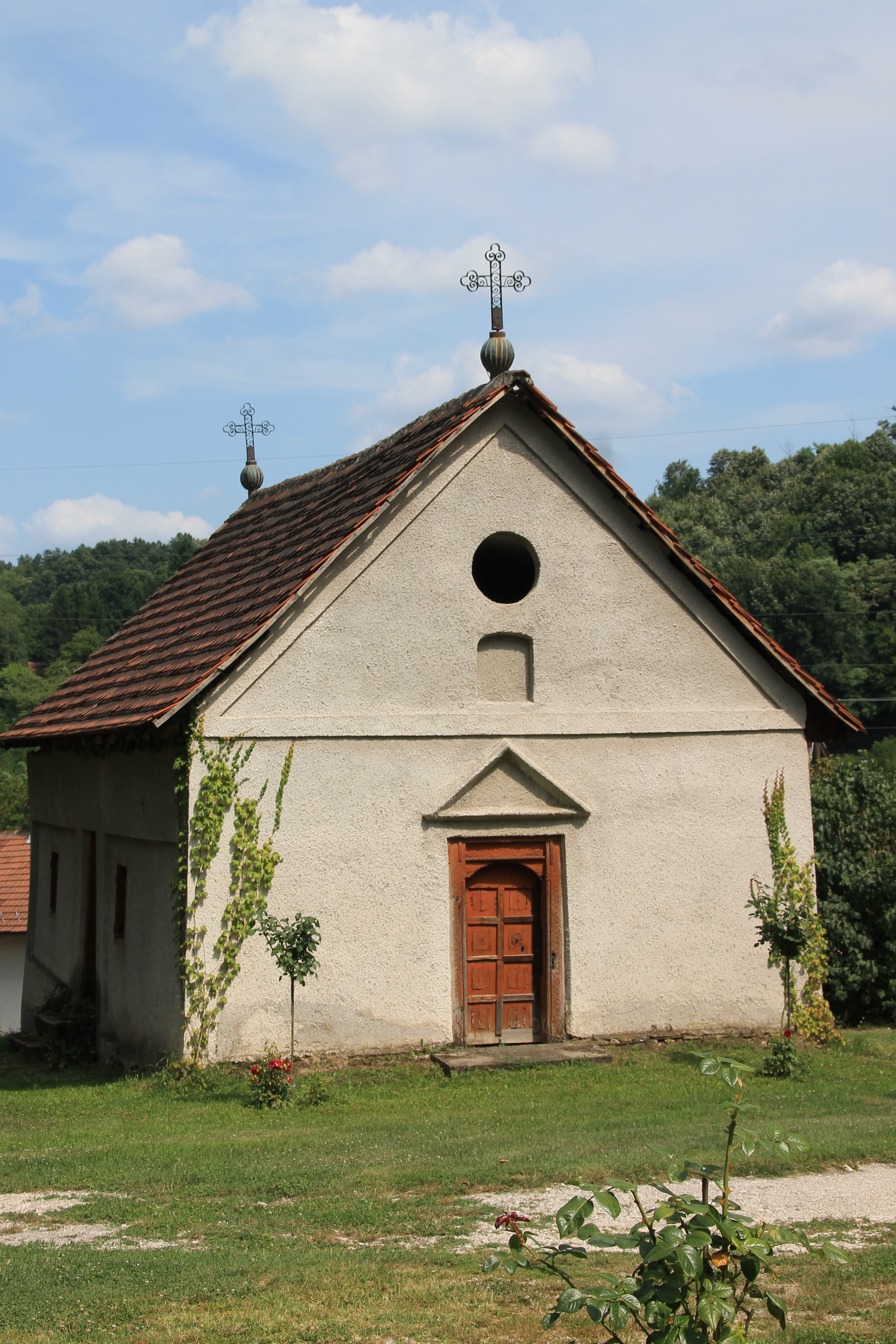 Crkva Pokrova Presvete Bogorodice (Jarmenovci)